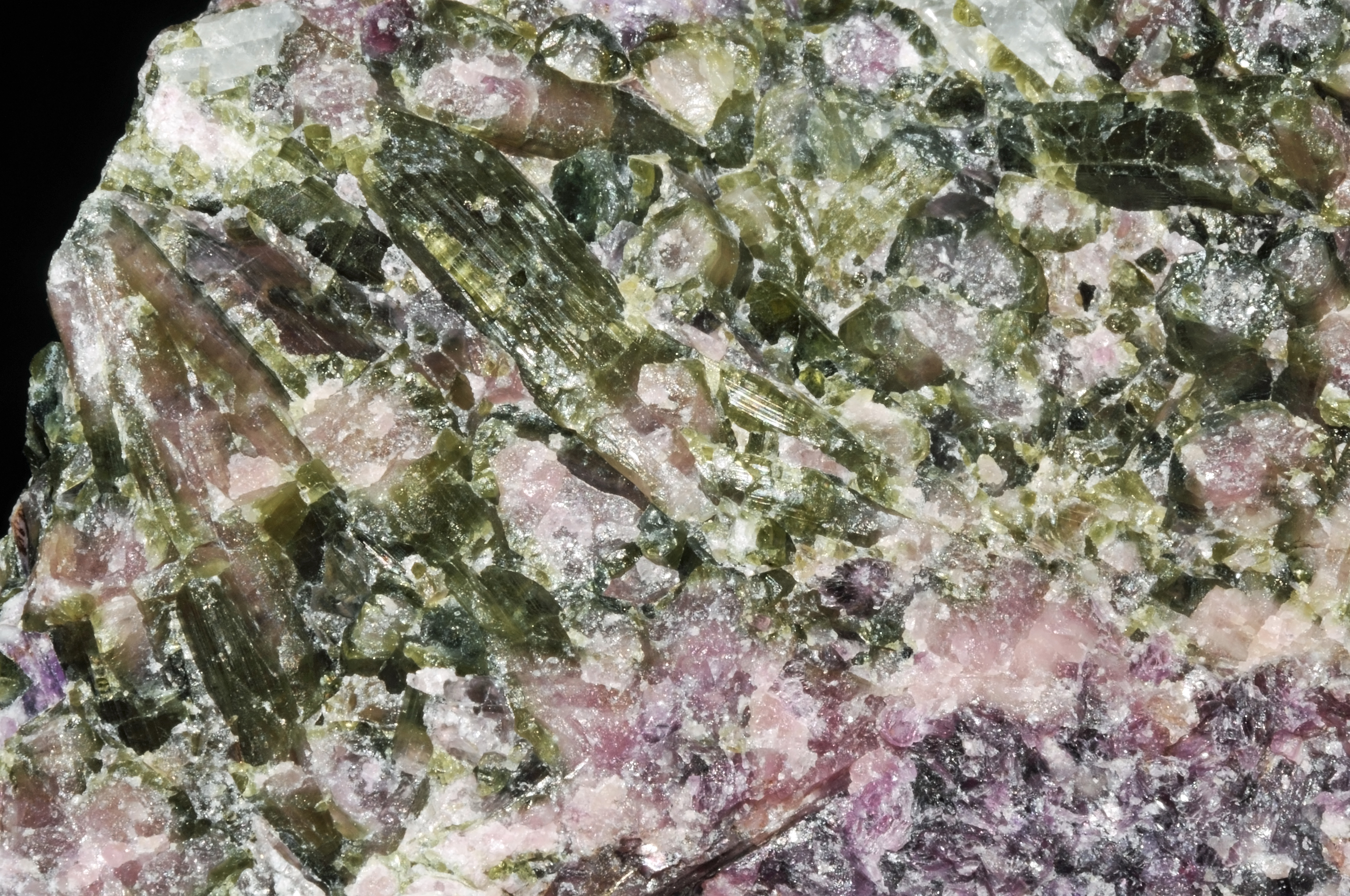 pegmatite à cristaux de tourmalines var. elbaïte et à mica var. lépidolite